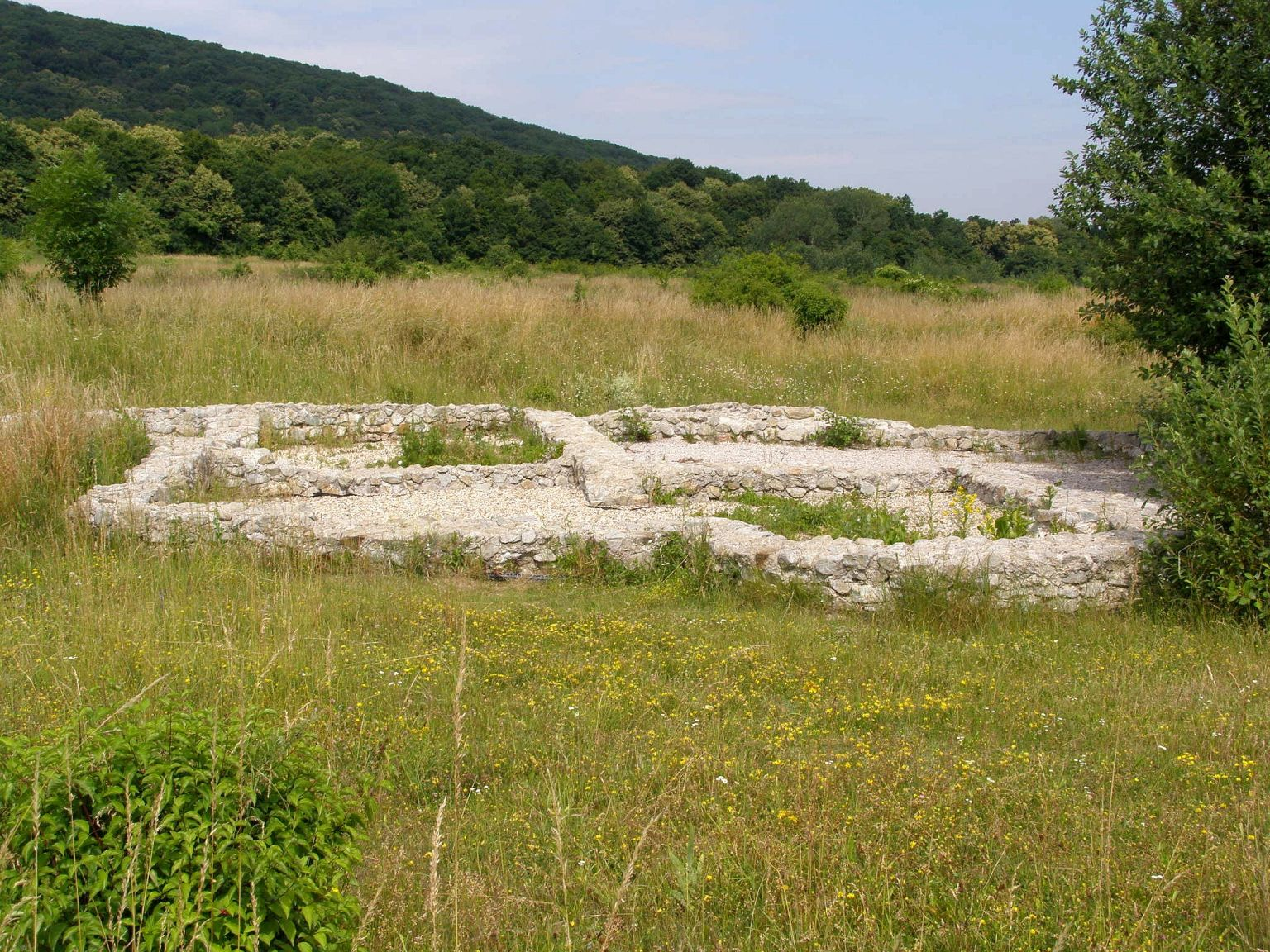 Villa rustica v bratislavej Dúbravke; celkový pohľad